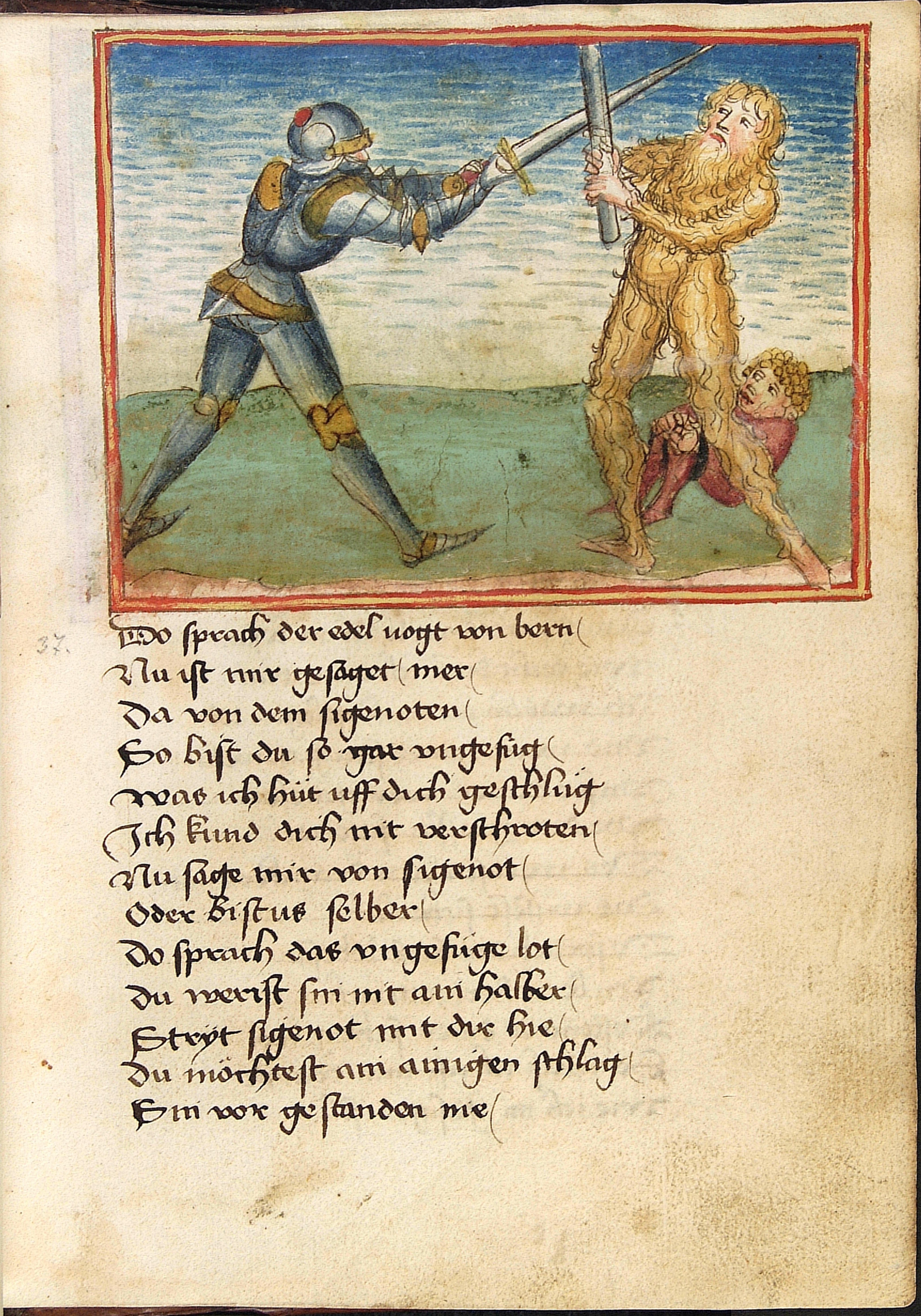 Codex Palatinus germanicus 67, Blatt 19r - Sigenot, Dietrichs Kampf mit dem wilden Mann, Dietrich, führt mit dem Schwert einen Schlag gegen den wilden Mann, den dieser mit einer Stange abwehrt, am Boden der gefesselte Baldung (Bild 8 von 14 dieser Kampfdarstellung)